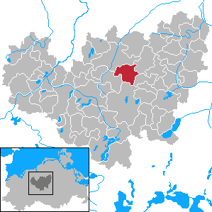 Diekhof in Mecklenburg-Vorpommern - District Güstrow